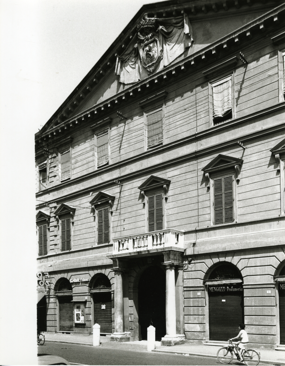 Servizio fotografico : Forlì, 1971 / Paolo Monti, Istituto di fotografia Paolo Monti. - Stampe: 5 : Positivo b/n, gelatina bromuro d'argento/ carta, 24x30. - ((Al verso delle stampe manoscritti i numeri dei negativi corrispondenti: 1711/4, 1712/20, 1712/23, 1712/31, 1712/33. Sul coperchio della scatola, manoscritto a pennarello: "Centri Storici/ Forlì". - Occasione: Campagna di rilevamento del centro storico. - Fonte: Fattura di Paolo Monti: IV. Commesse/ Fattura/ Rilevamento fotografico del centro storico di Forlì (1971/10/18), presso Archivio Paolo Monti. N. 525 riprese fotografiche stampate in formato 24x30; n. 236 diapositive a colori Ektachrome formato 35mm